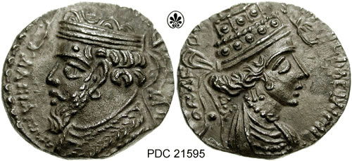 Münze des Phraakates mit Musa auf der Rückseite.